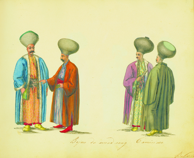 Bojars du second rang. Caminars.jpg